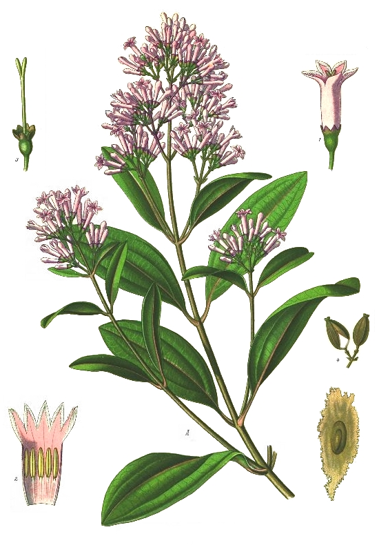 Fieberrindenbaum. A blühender Zweig, natürl. Grösse; 1 Blüthe, vergrössert; 2 dieselbe im Längsschnitt, desgl.; 3 Kelch mit hervorragendem Griffel und Narbe, vergrössert; 4 Theil der Fruchtrispe, natürl. Grösse; 5 Same, vergrössert.